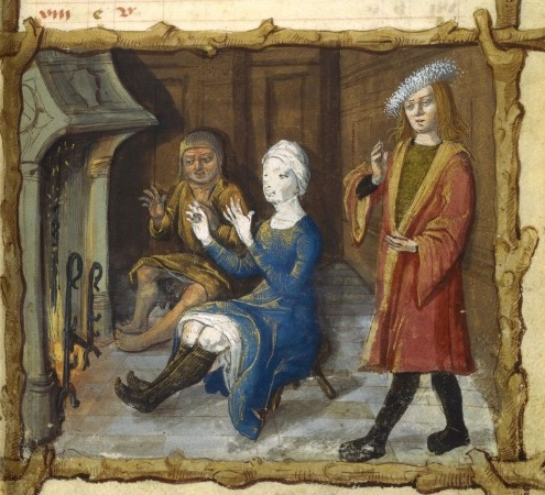 Enluminure - Le repos près du feu - Jean de Montluçon.